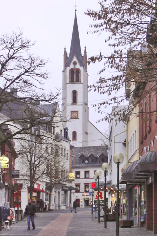 Sujet:Hermeskeil Kierch Source:Eege Foto vum Benutzer:Ssch opgehellt vum Cornischong